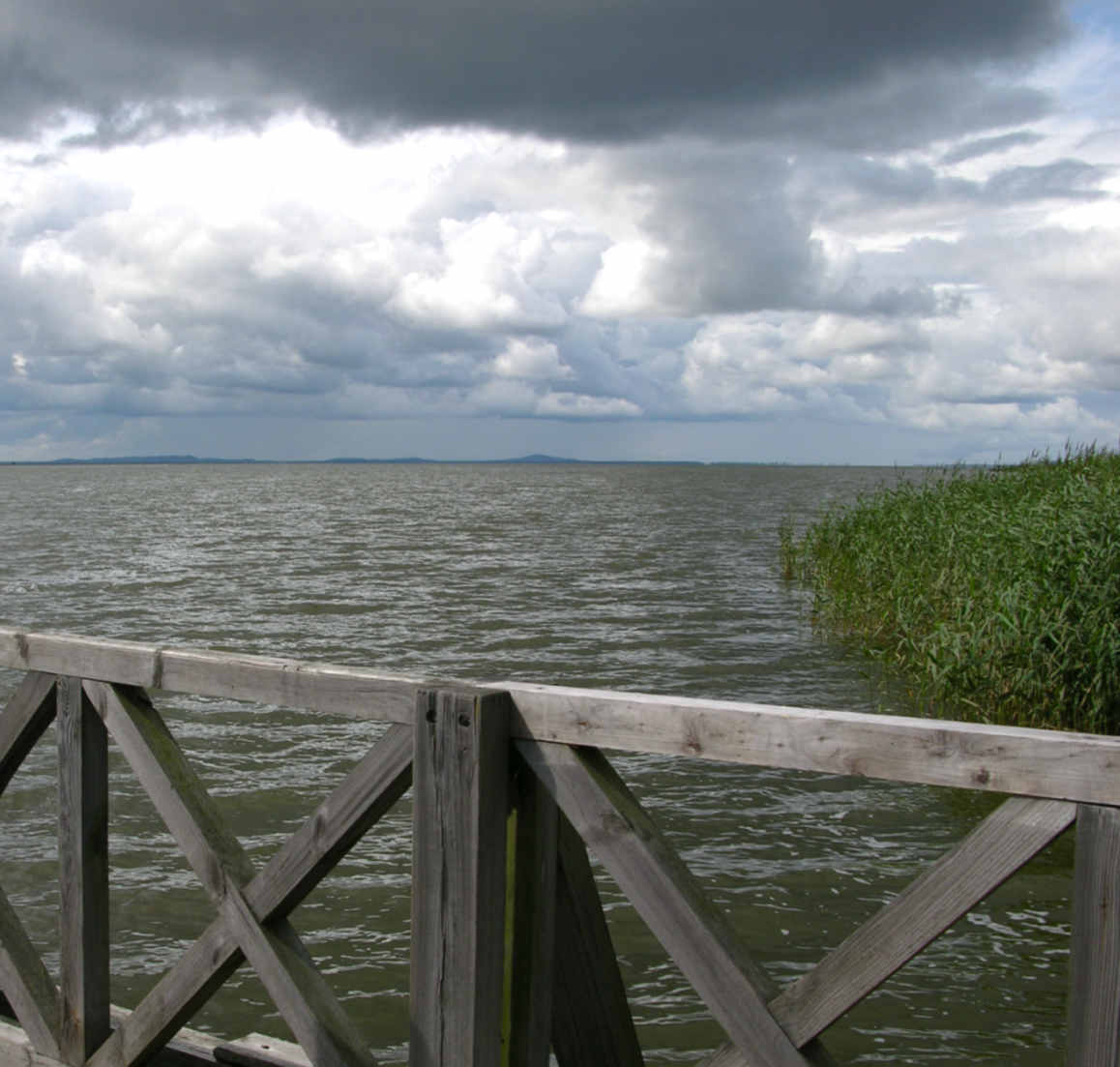 Rowokół od przystani Łeby